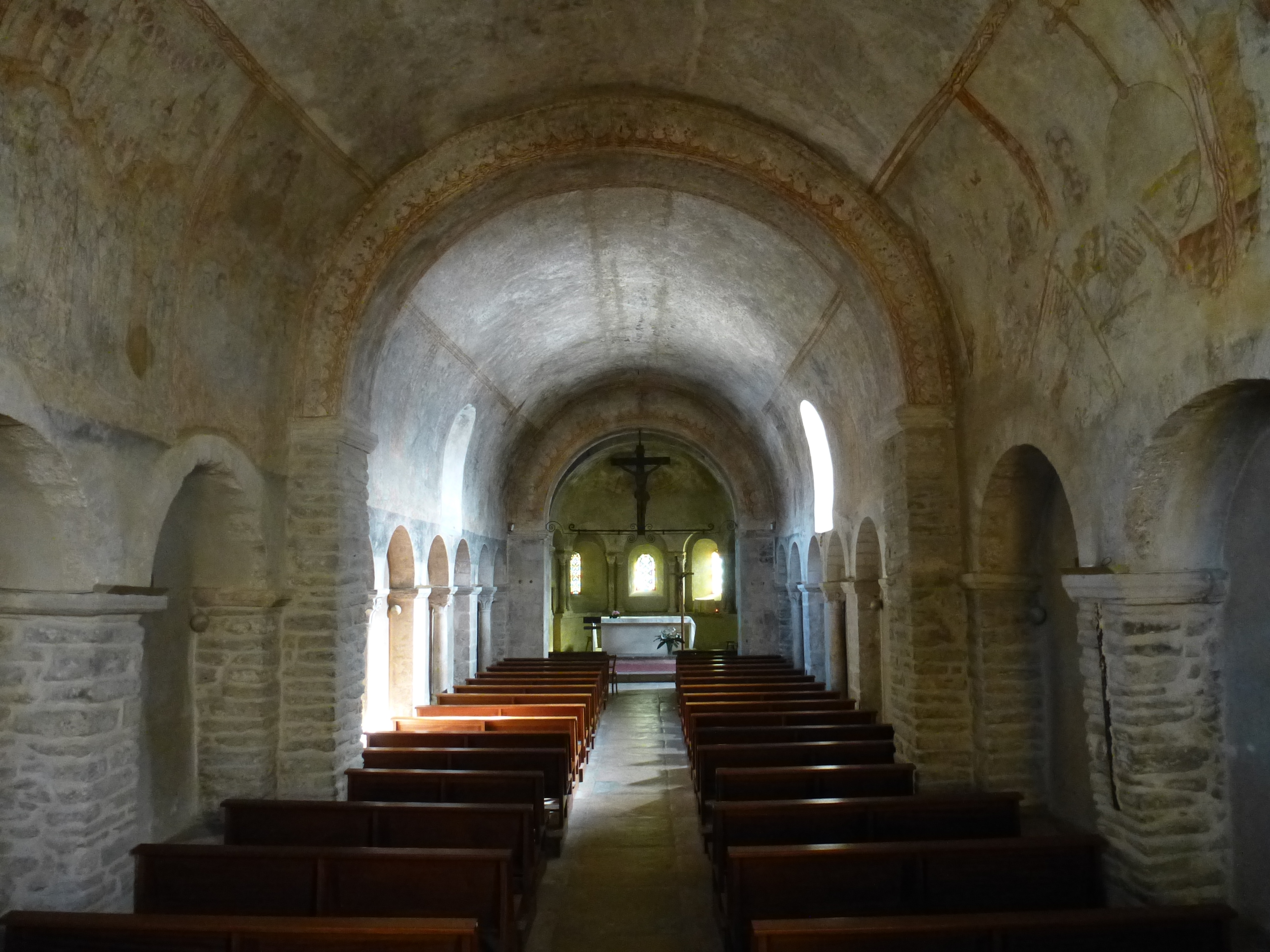 Eglise 12ème siècle